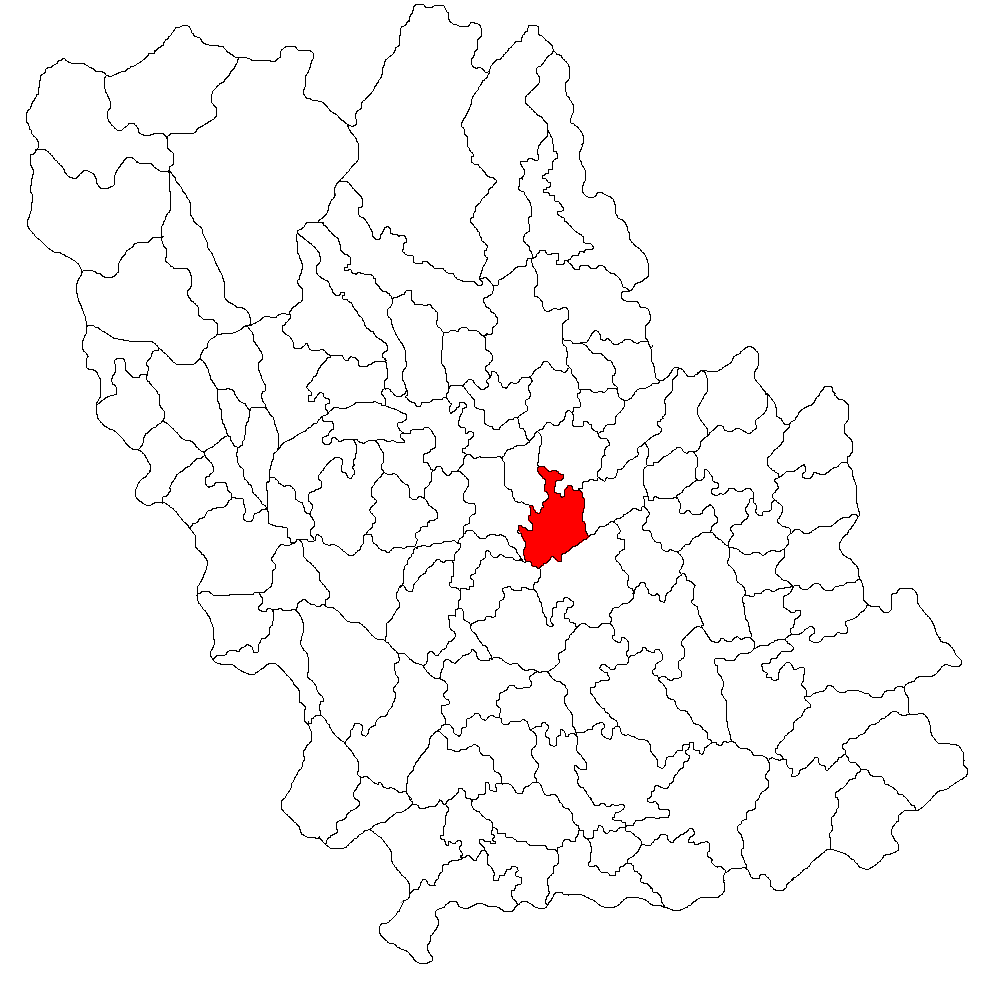 Categorie:Hărţi ale judeţului Prahova